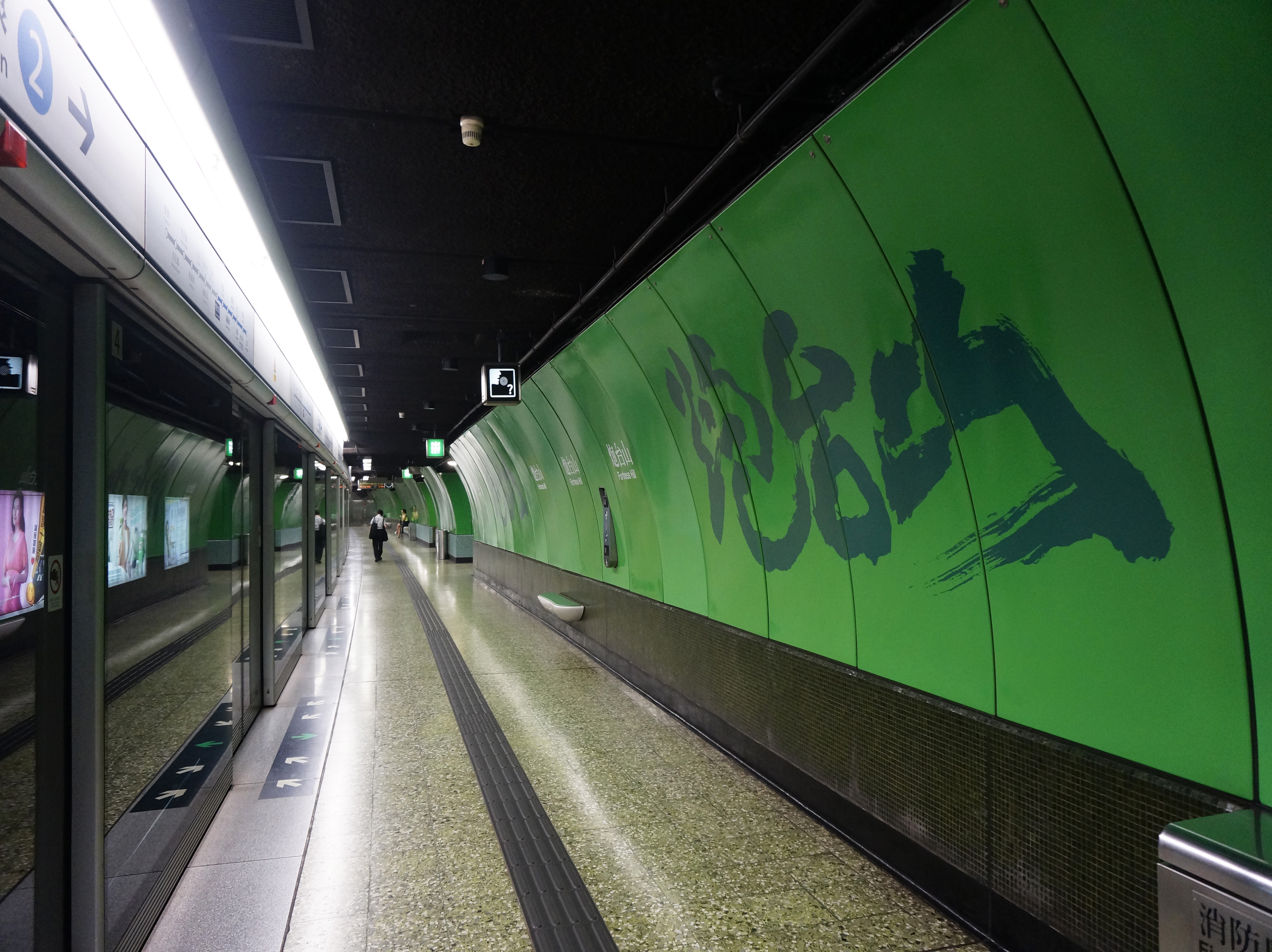 港鐵炮台山站月台